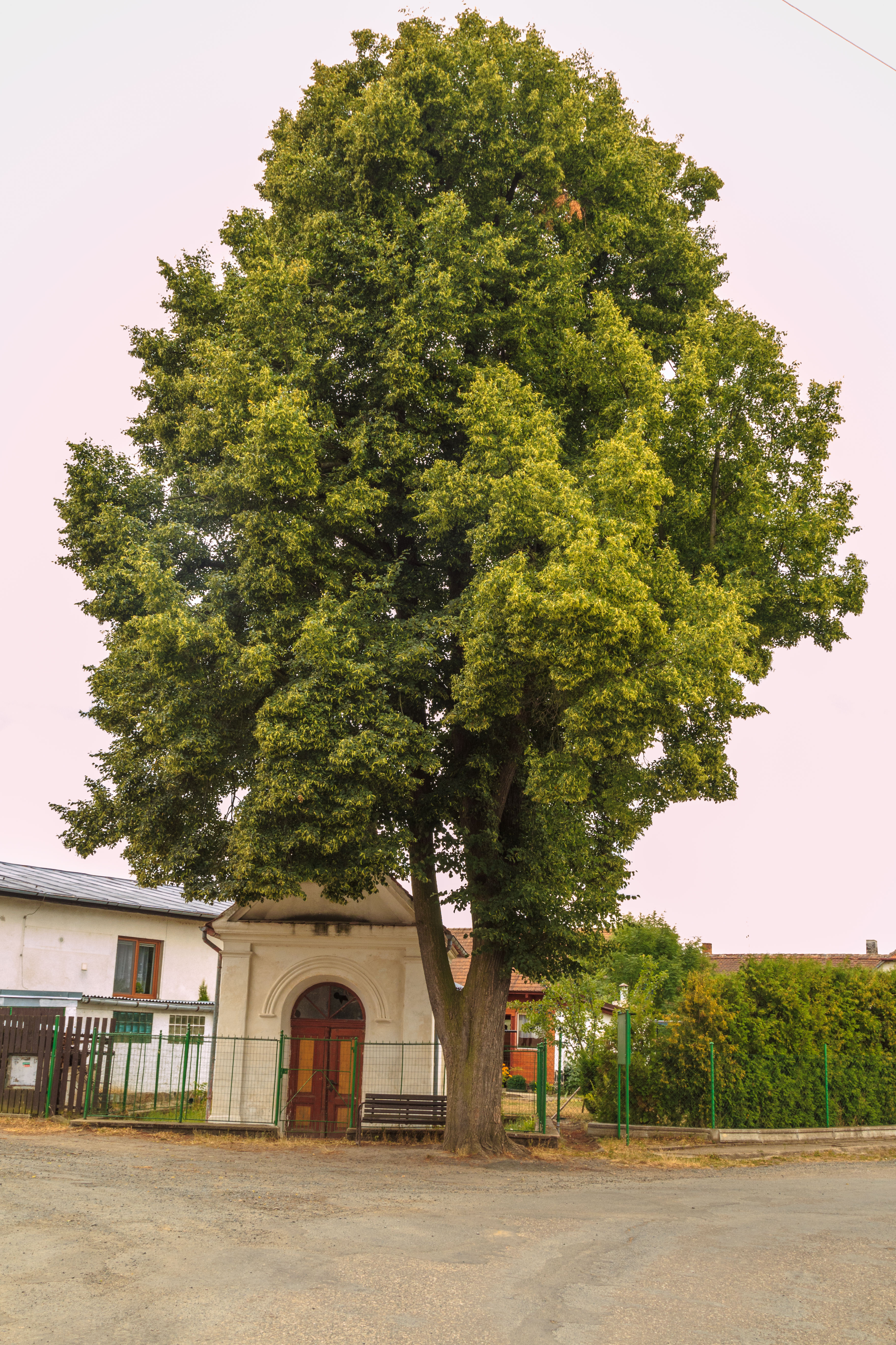 Kamenné mosty kaple